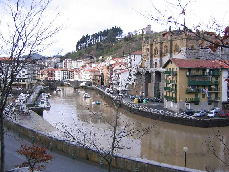 Vista pacial de Ondarroa, Vizcaya, País Vasco, España.